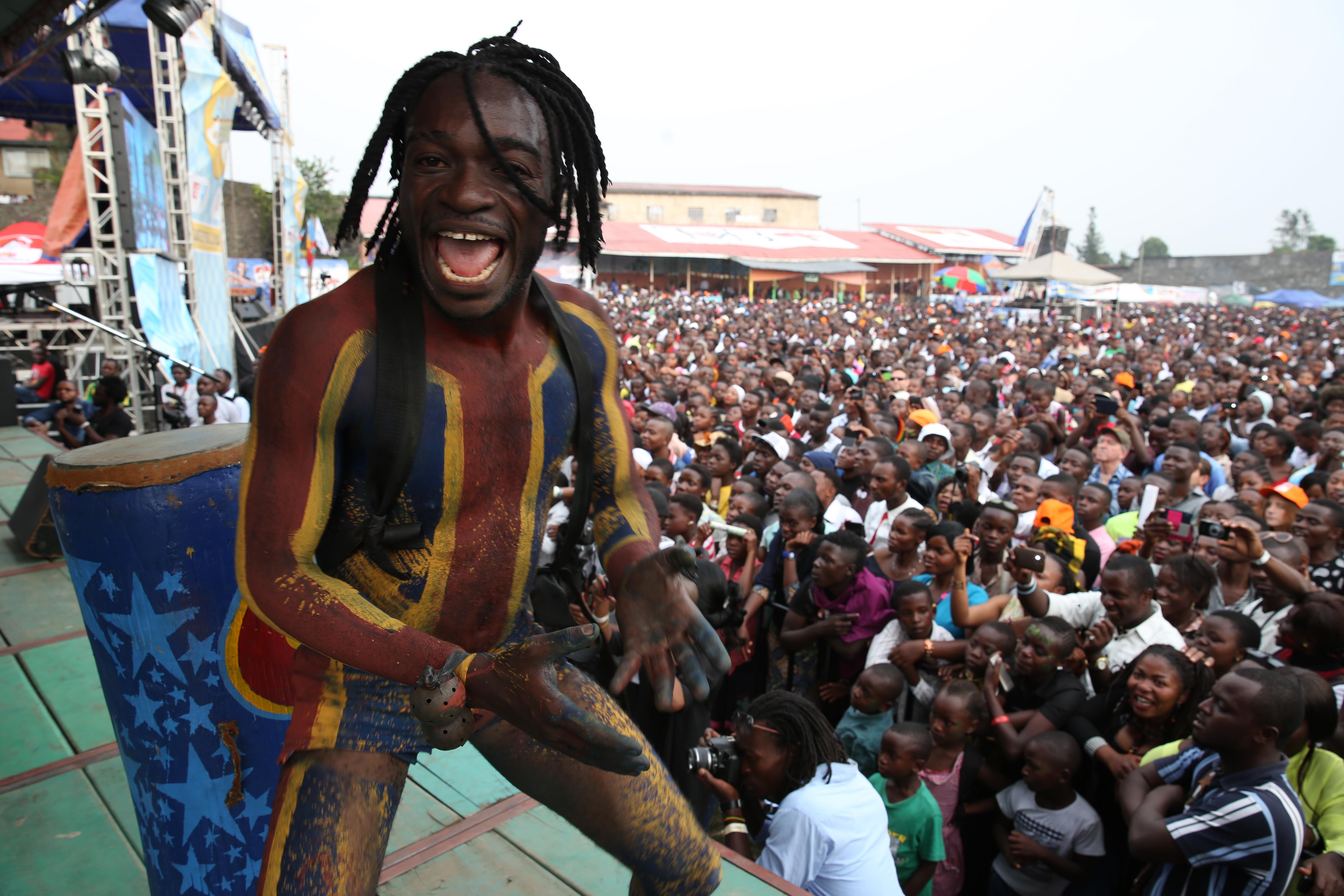 Photo MONUSCO / Abel Kavanagh